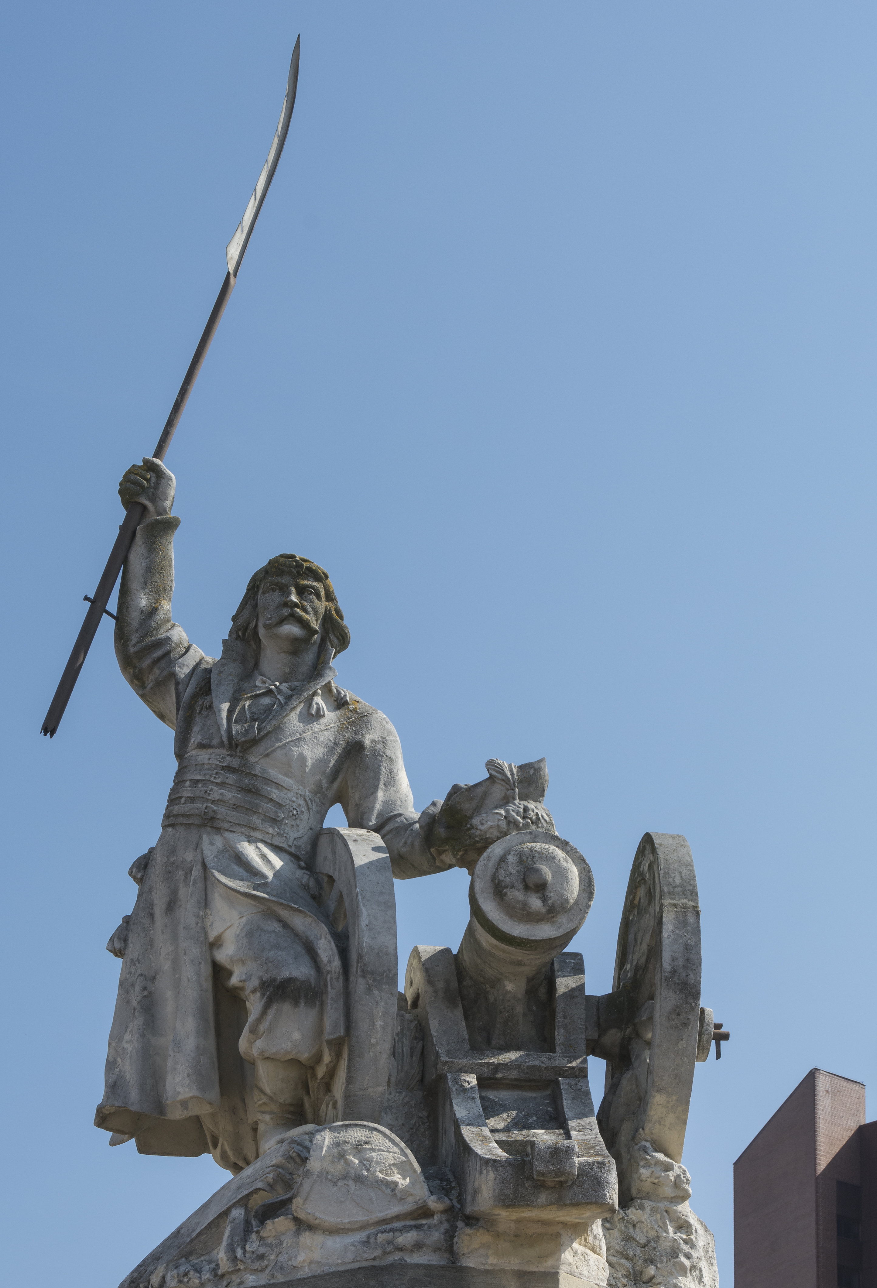 Tarnobrzeg, układ urbanistyczno-krajobrazowy, XVI, XVII-XIX